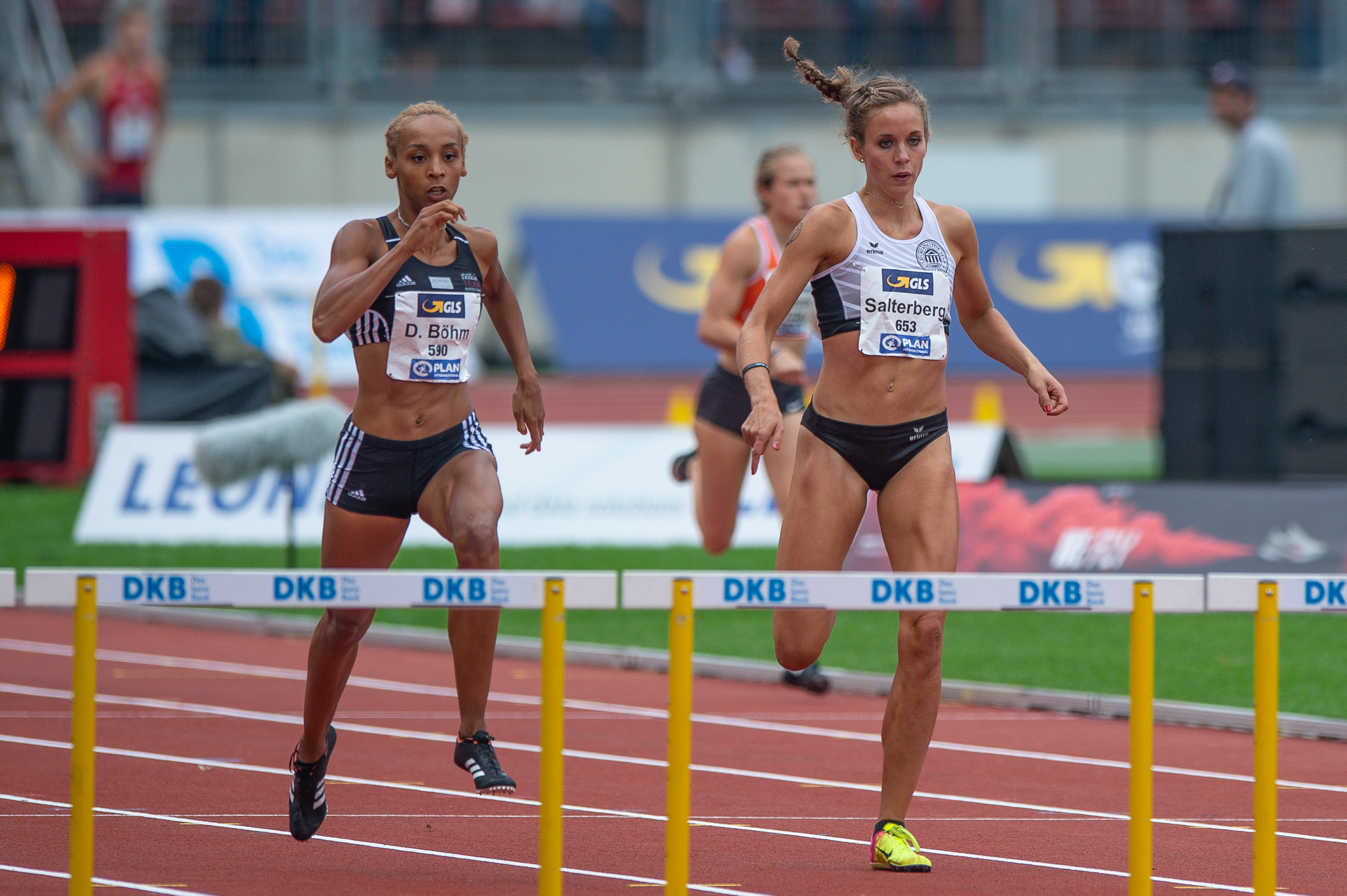 400 metres hurdles,400-Meter-Hürdenlauf,ART Düsseldorf,Christine Salterberg,DLV,Deutsche Leichtathletik Meisterschaften 2018,Deutscher Leichtathletik-Verband,Djamila Böhm,LT DSHS Köln,Max-Morlock-Stadion